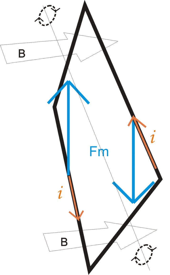 Força magnética sobre espira imersa em campo magnético, sob ação de corrente elétrica.